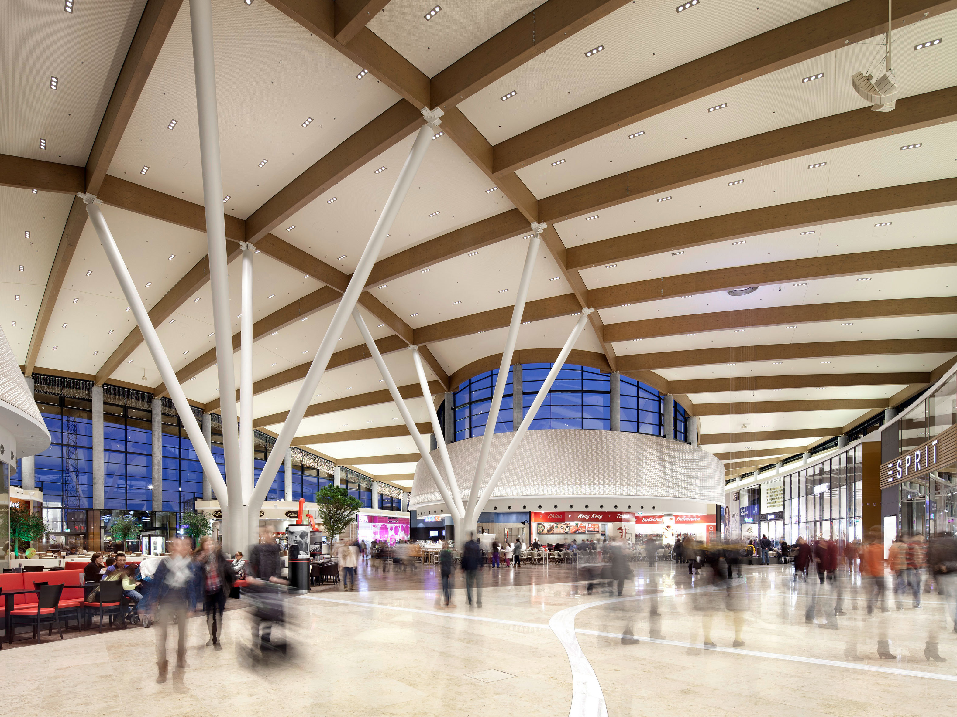 ATP G3 Shopping Resort